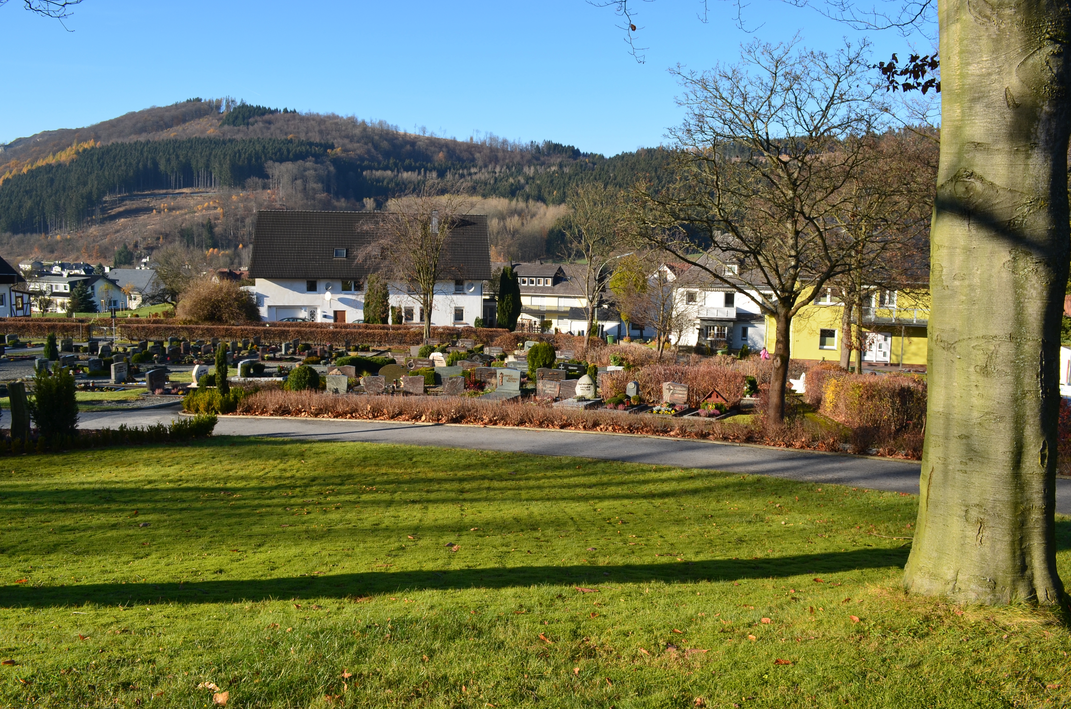 Brilon, Hoppecke, Friedhof